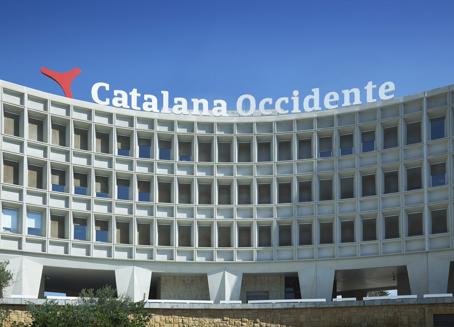 Catalana Occident, oficinas en Barcelona